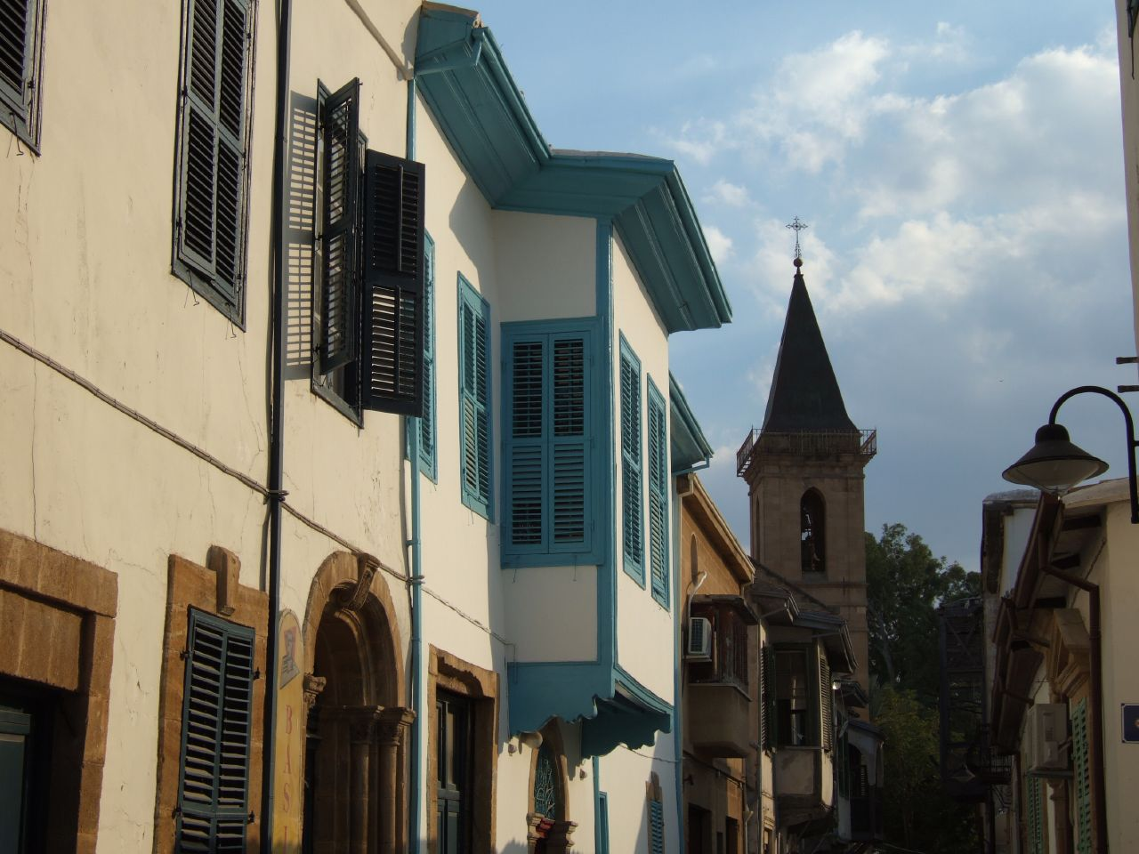 Nicosia, CiproRenovation